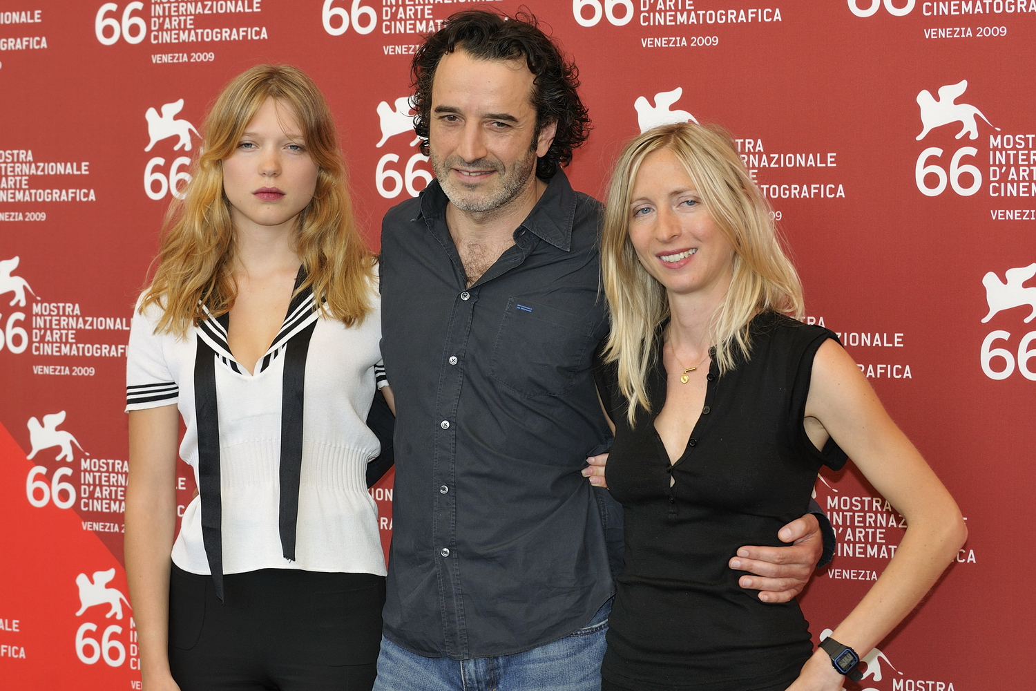 66ème Festival du Cinéma de Venise (Mostra), 3ème jour (04/09/2009)